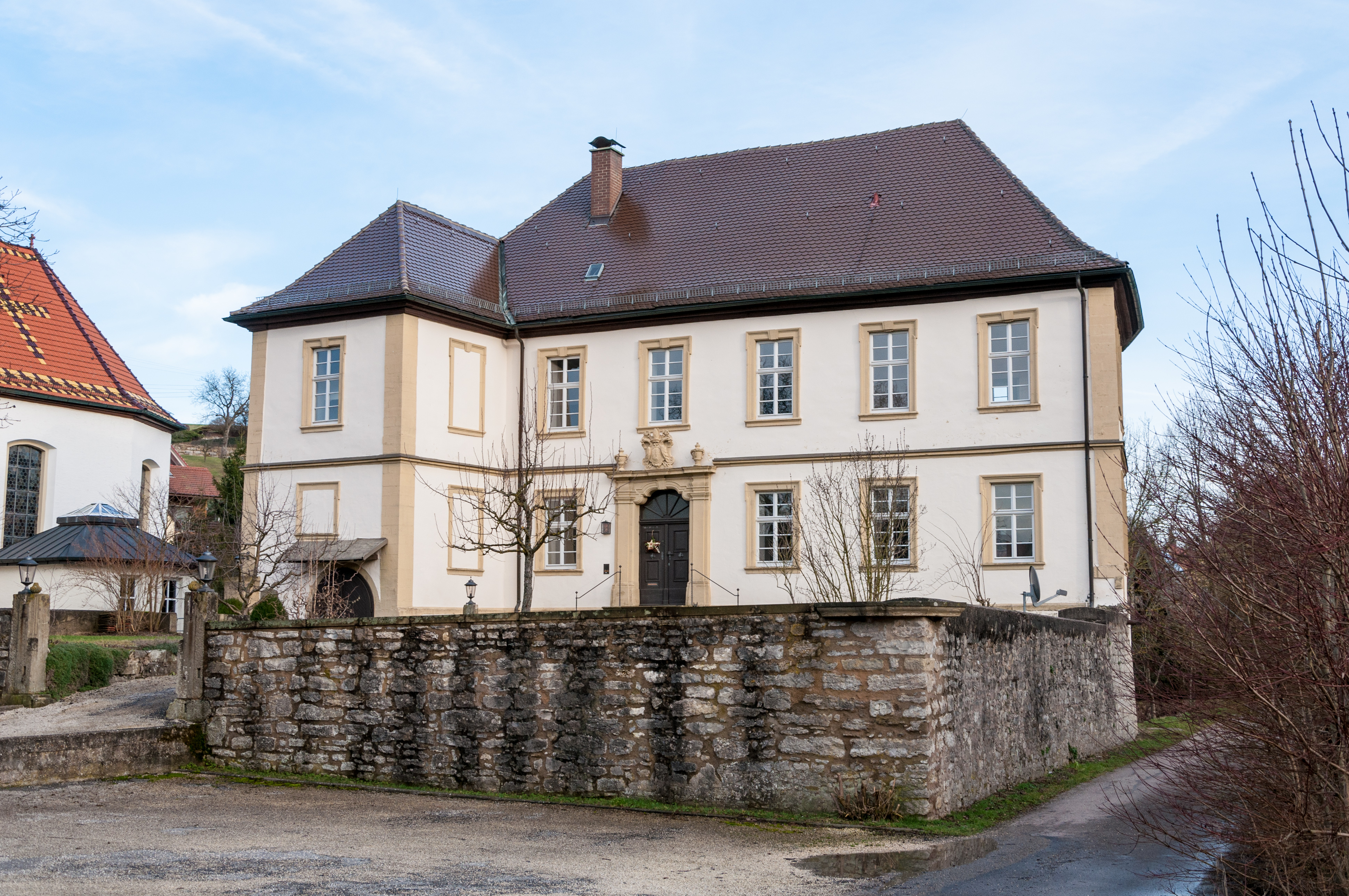 Ehemaliges Wasserschloss in Bieringen, heute genutzt als Pfarrhaus.